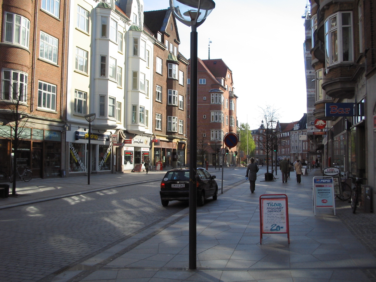 Aalborg, Denmark. The Boulevard.